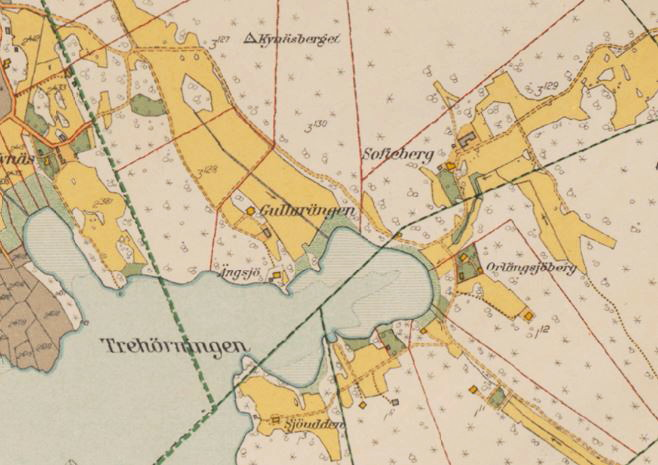 Del av 1934 års karta över Stockholm med omgivningar med Gullarängens gård